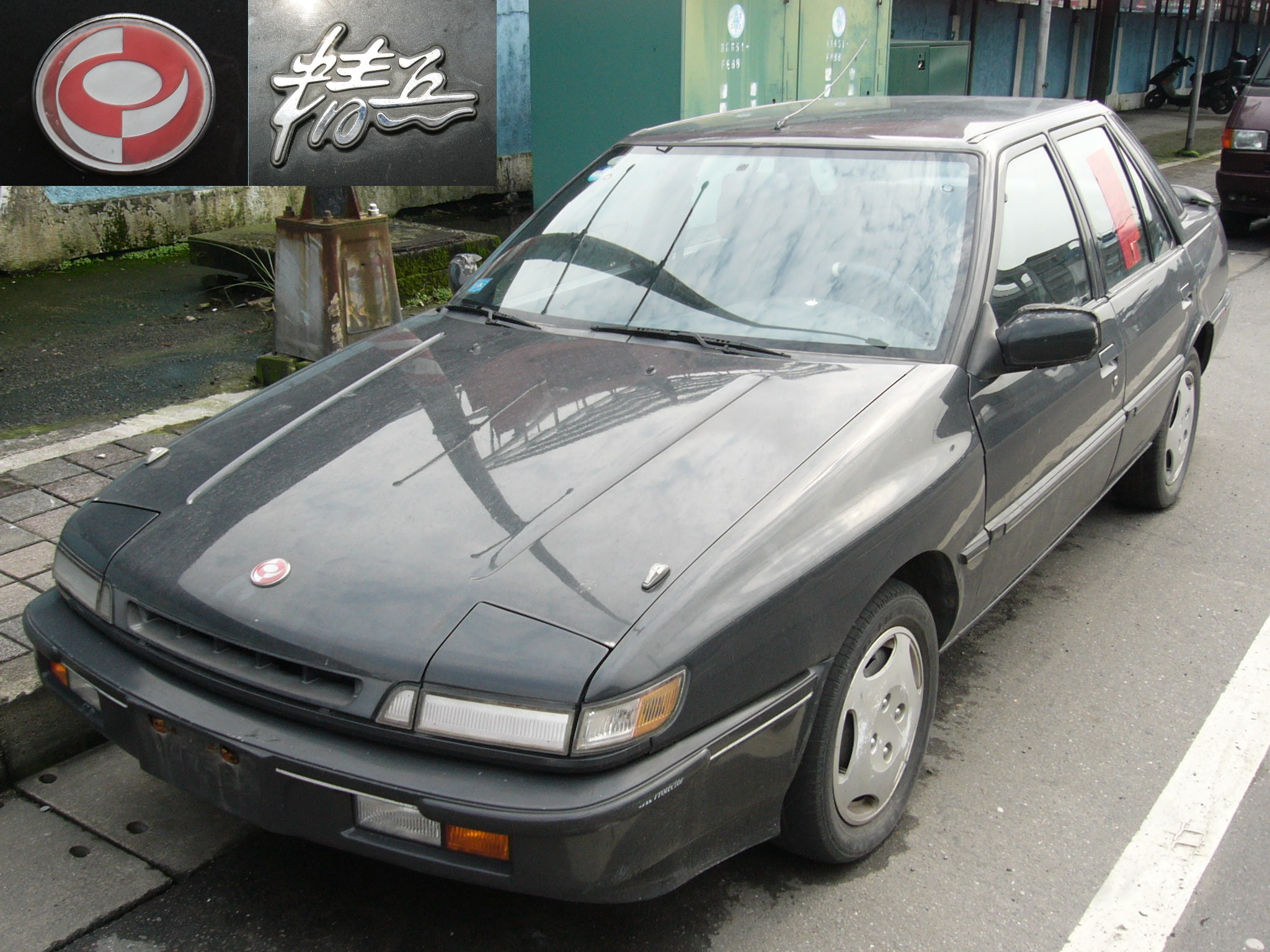 1994年裕隆精兵GLi 1800c.c.手排轎車左前方外觀